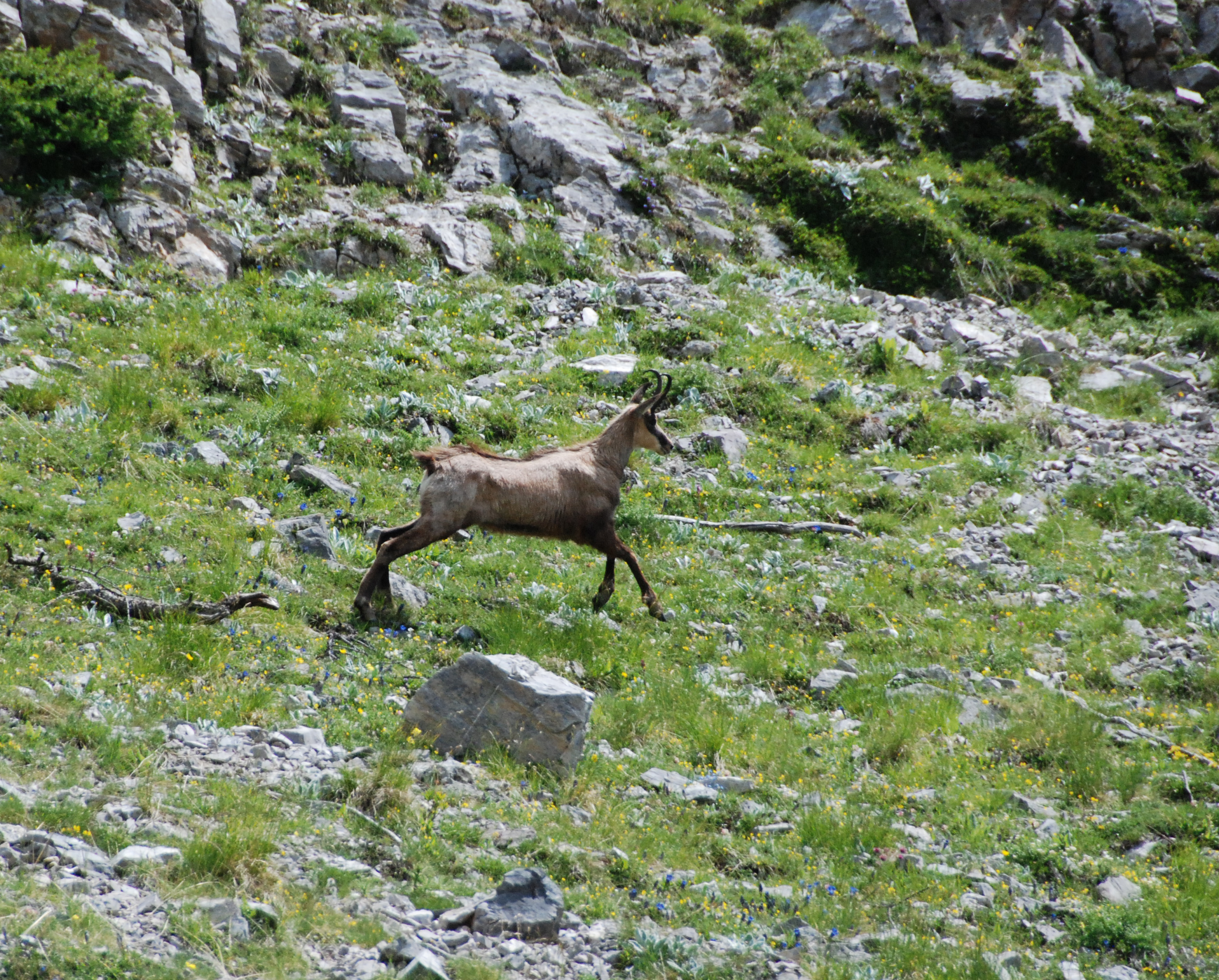 chamois bondissant dans le parc du mercantour